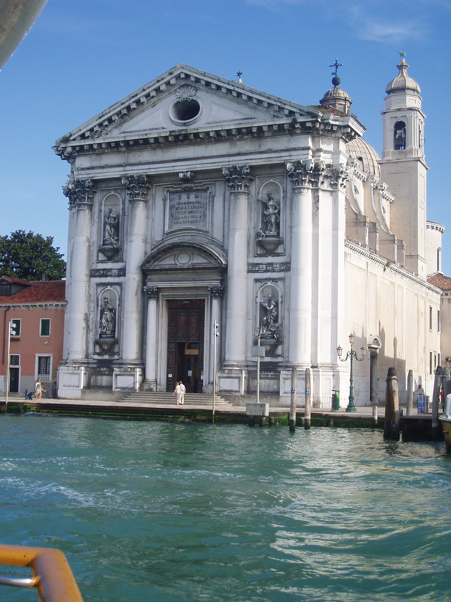 Gesuati - Zattere - Venise